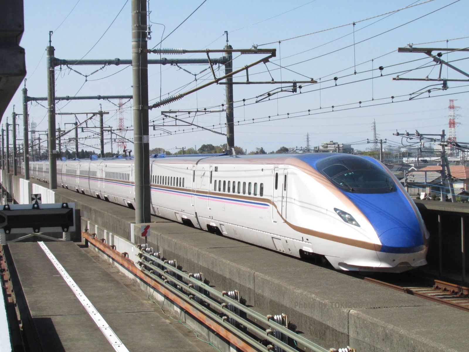 上越新幹線大宮～熊谷を走行するＥ７系Ｆ２１編成専用塗装。